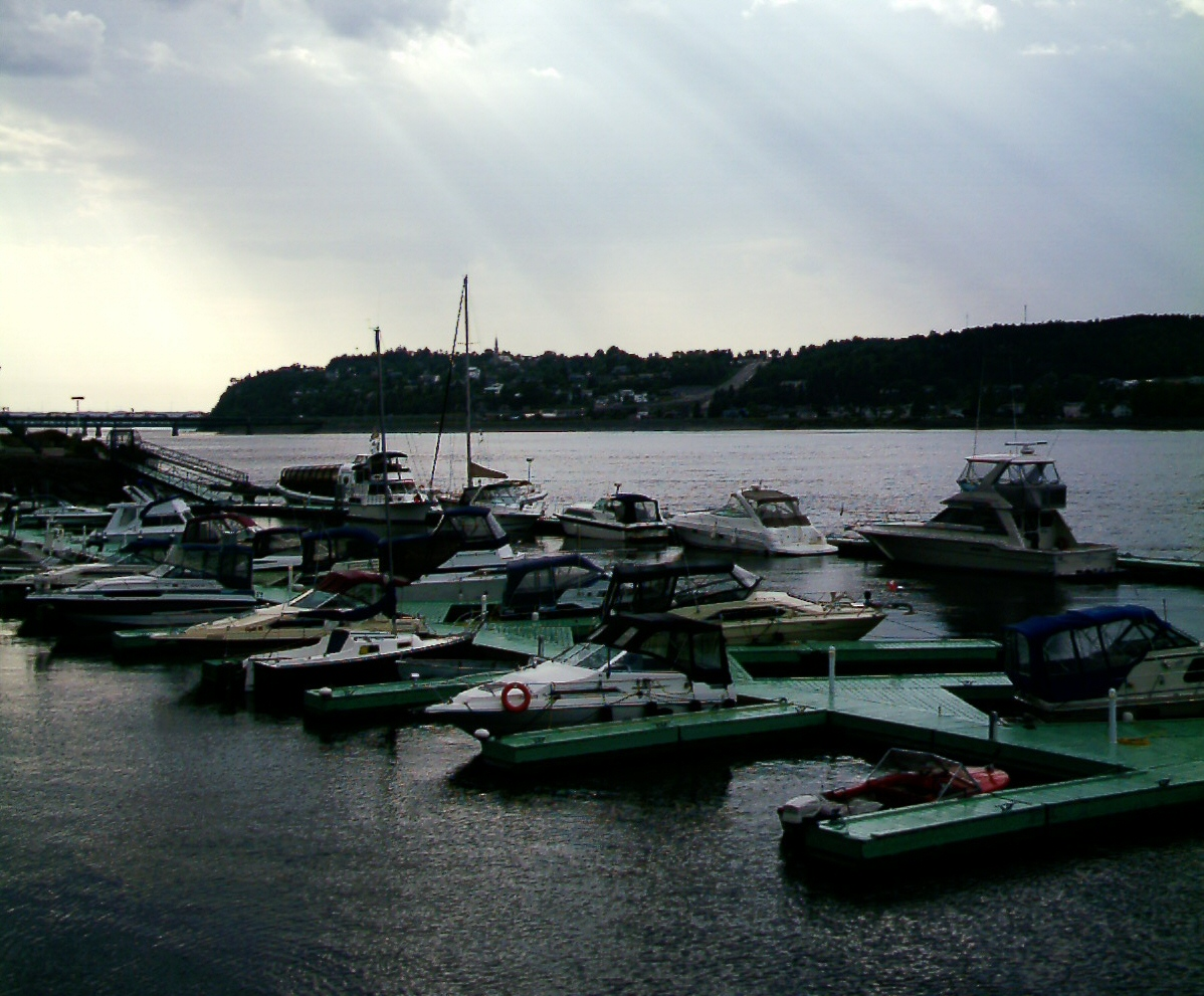 Marina de Chicoutimi